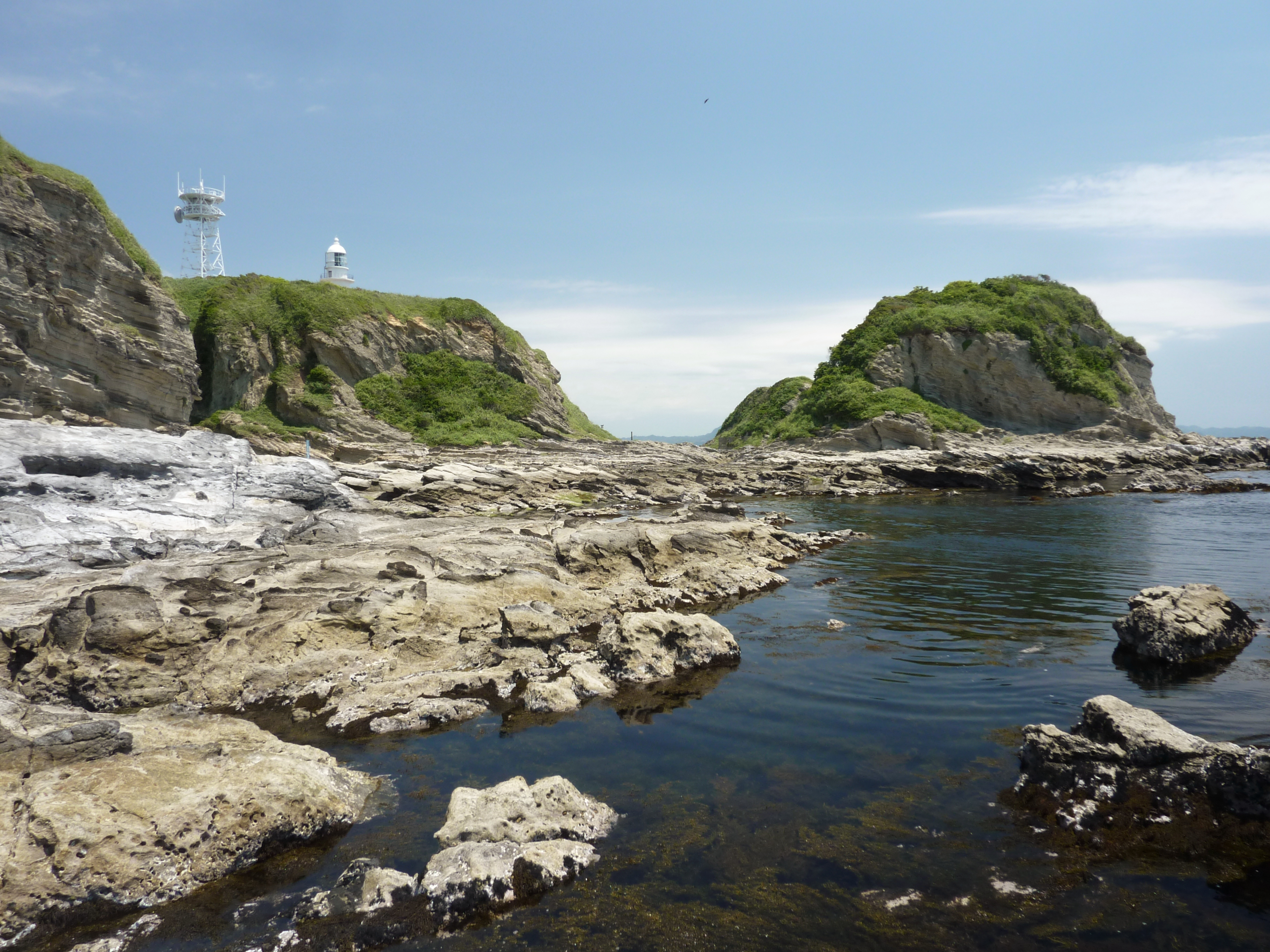 神奈川県三浦市・剱埼の海岸。足元に生い茂っているのはヒジキ。